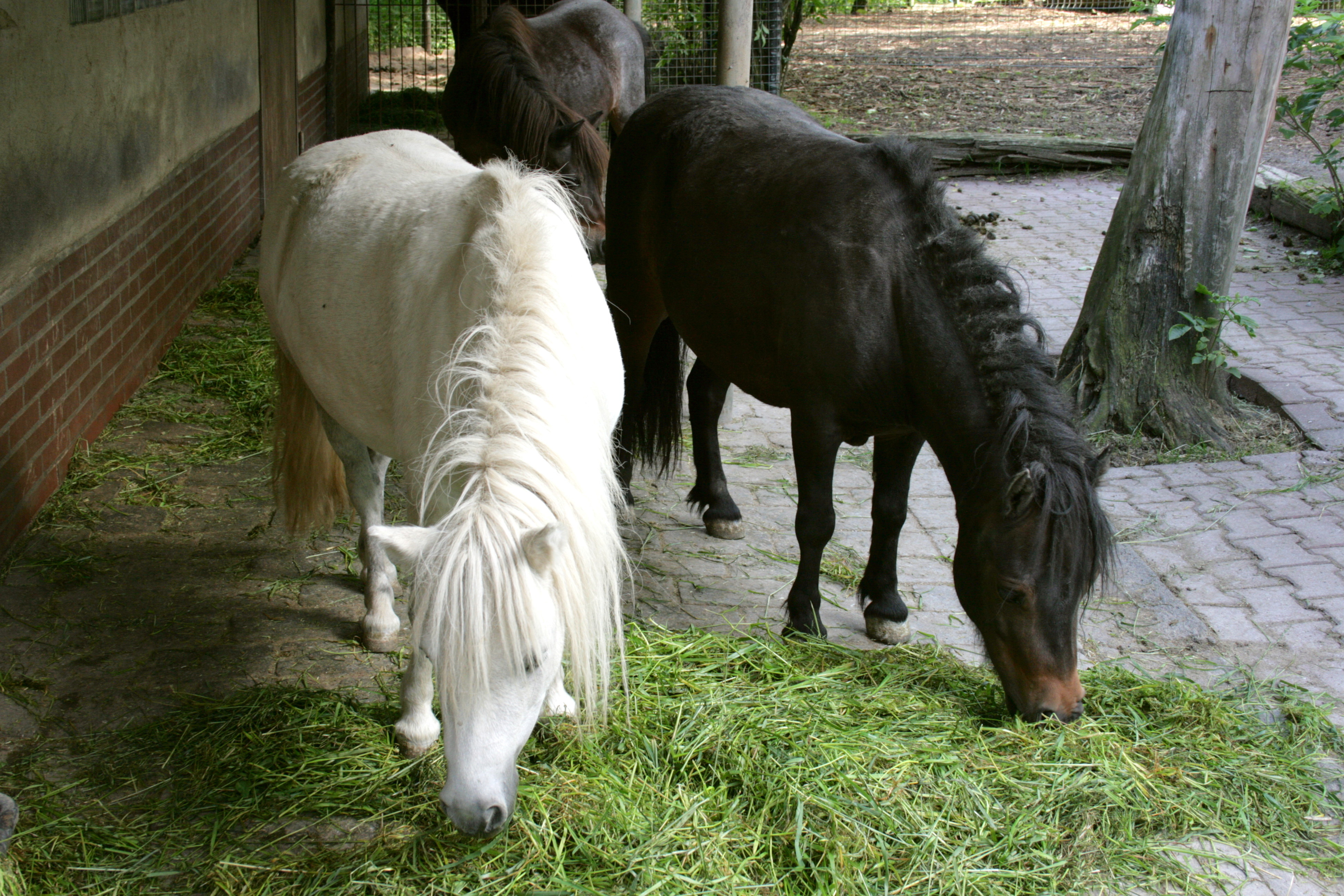 Shetland pony im Tierpark Fauna in Solingen-Gräfrath